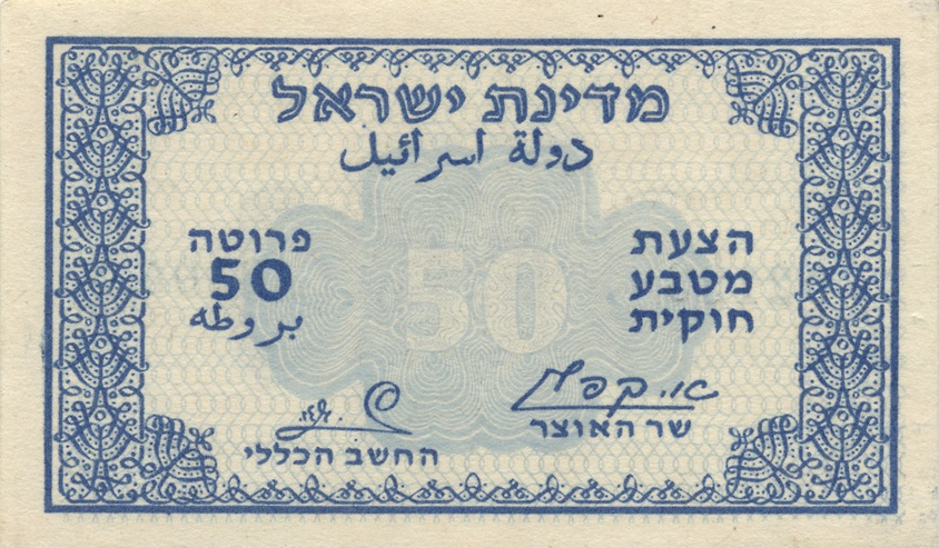 שטר נסיוני של 50 פרוטה